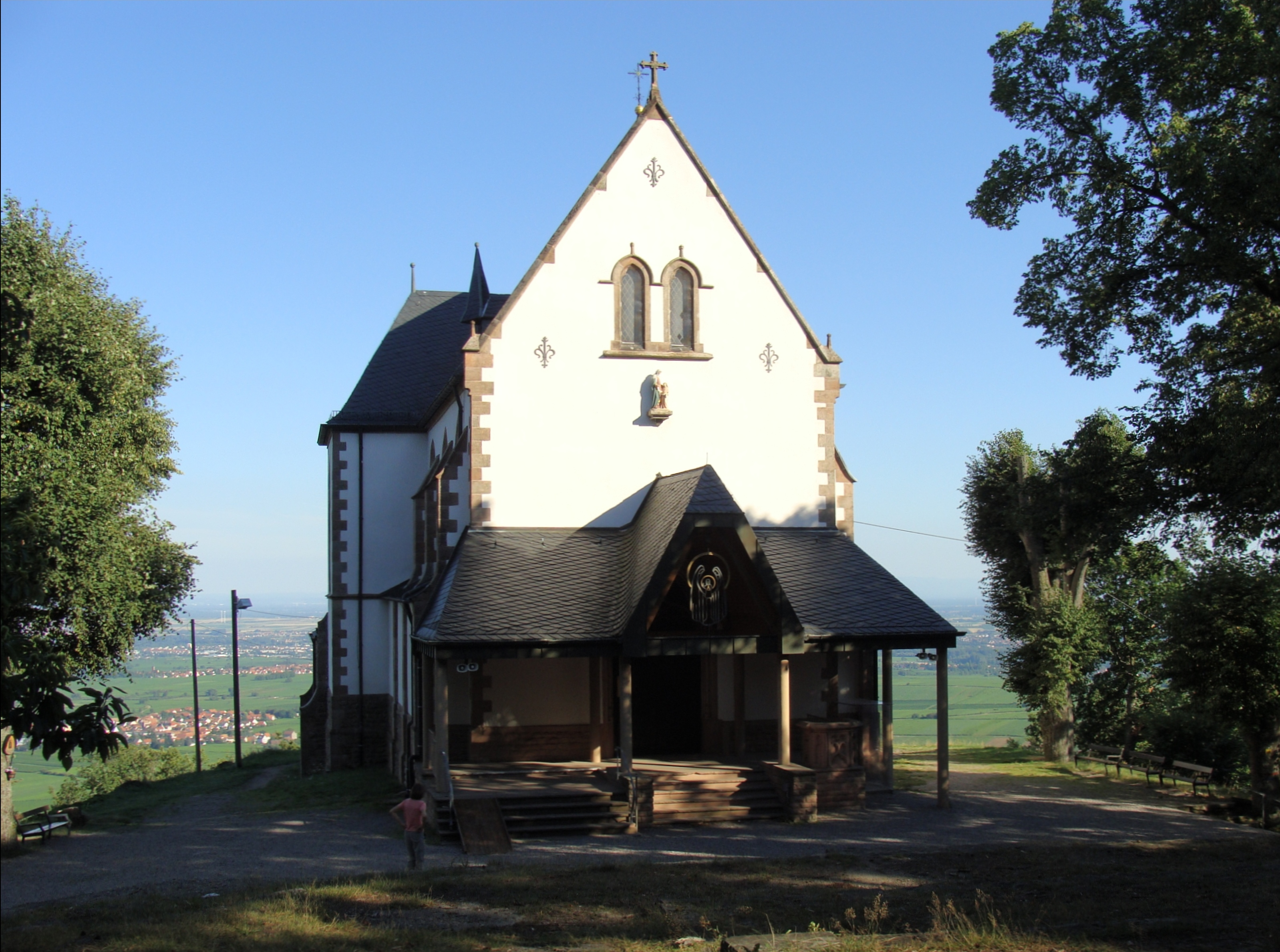 St. Anna-Kapelle bei Burrweiler